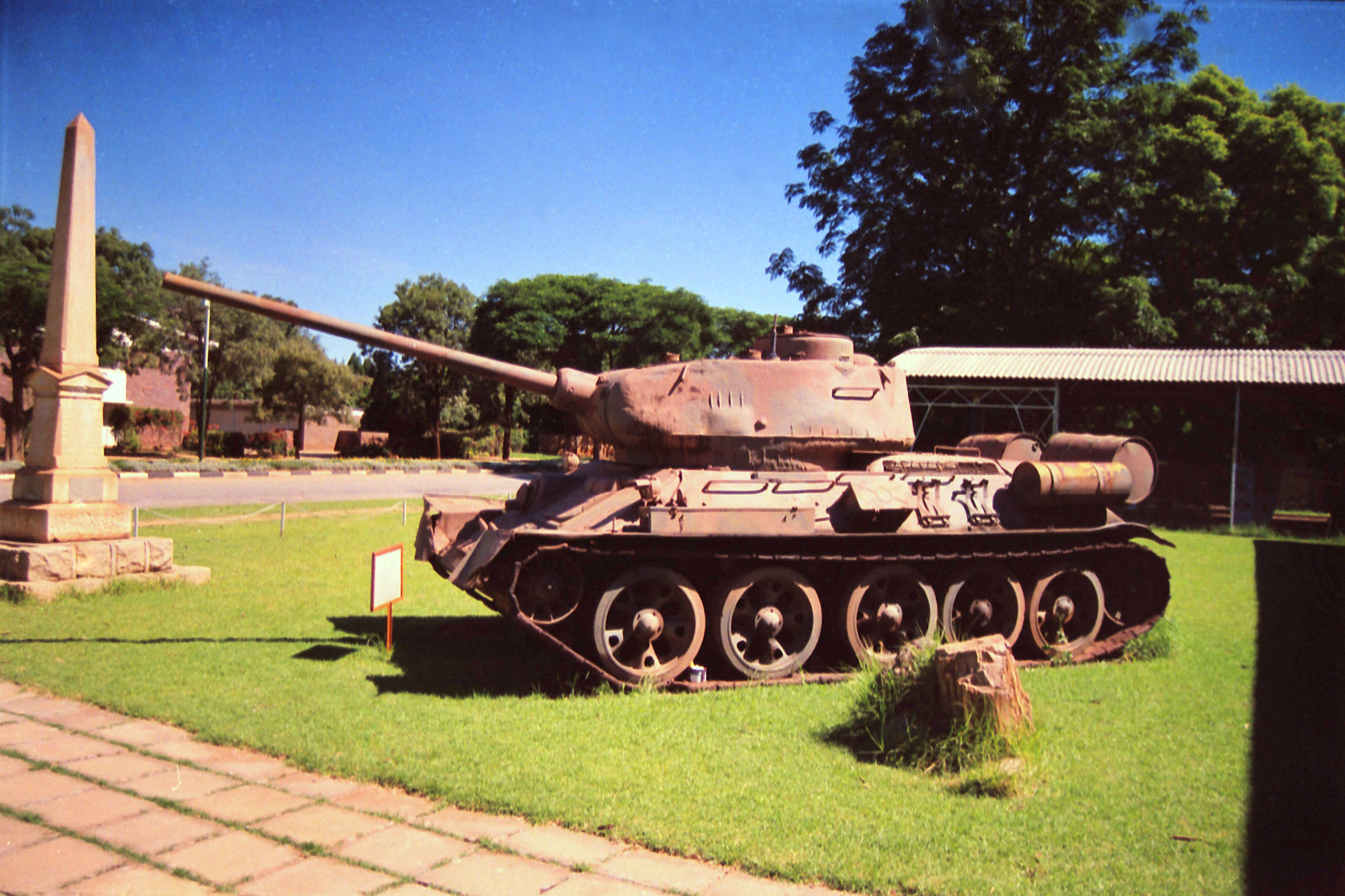 T-34 tank